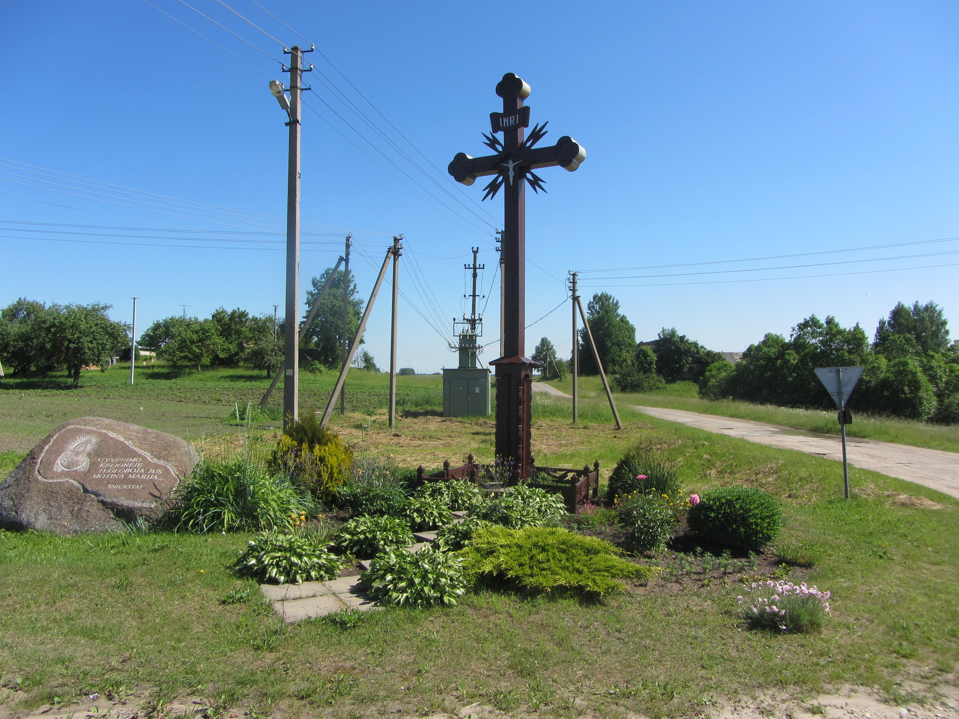 Šniukštai 32293, Lithuania